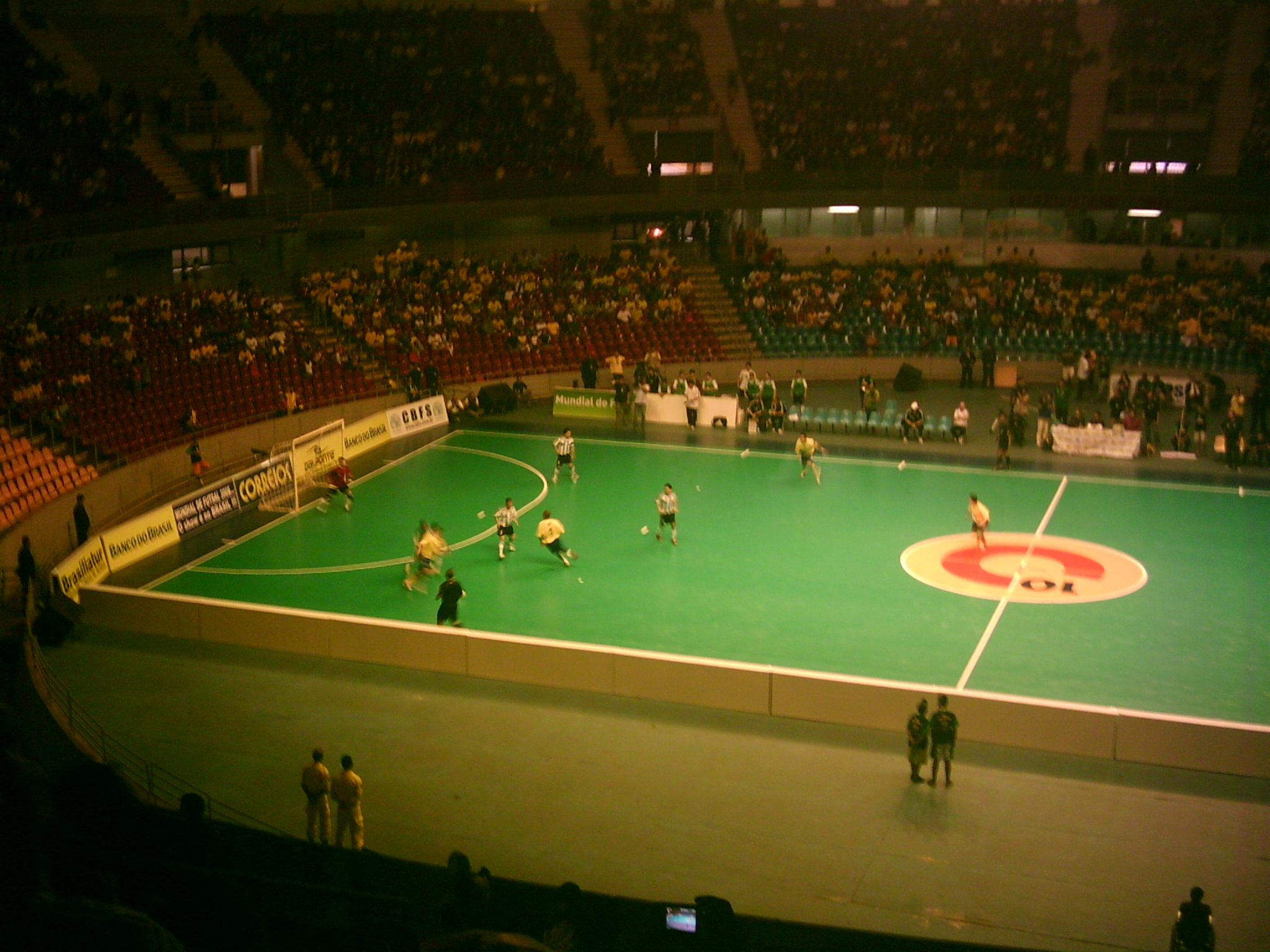 Partida amistosa entre Brasil e Argentina